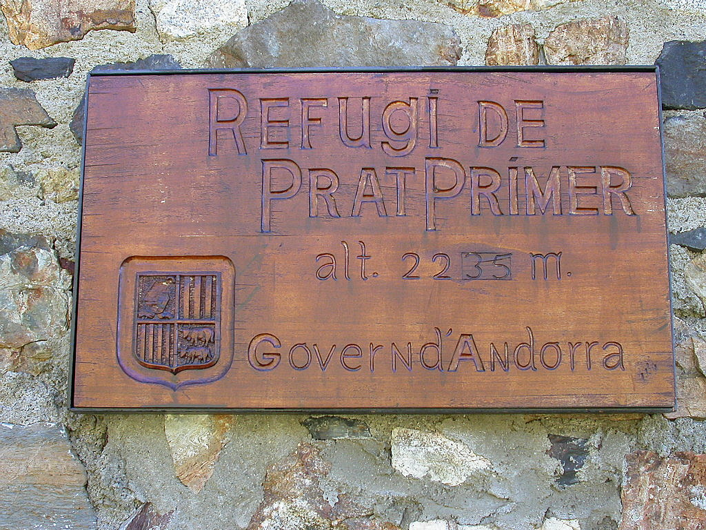 Refuges Andorre